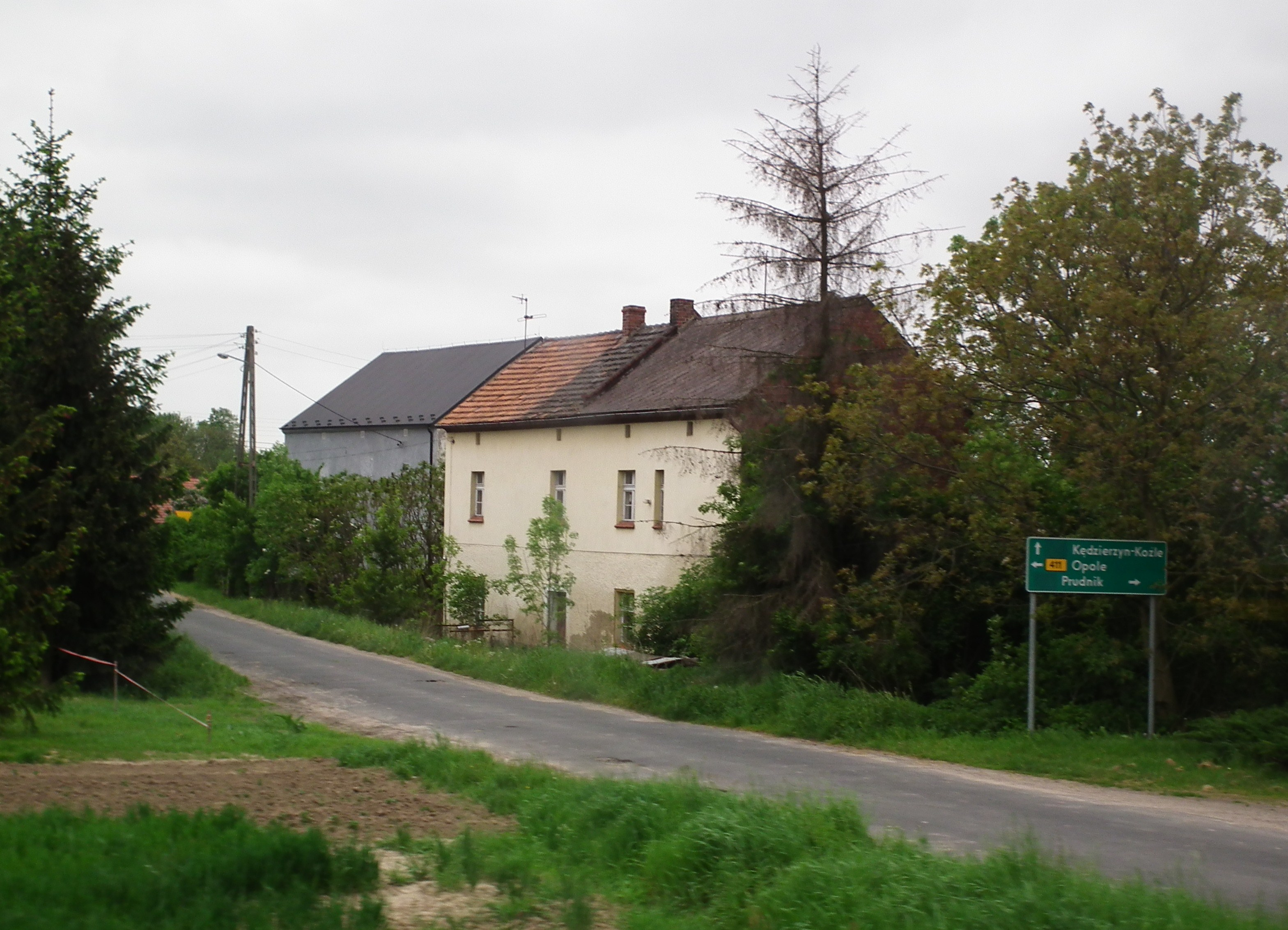 Lubrza koło Prudnika.